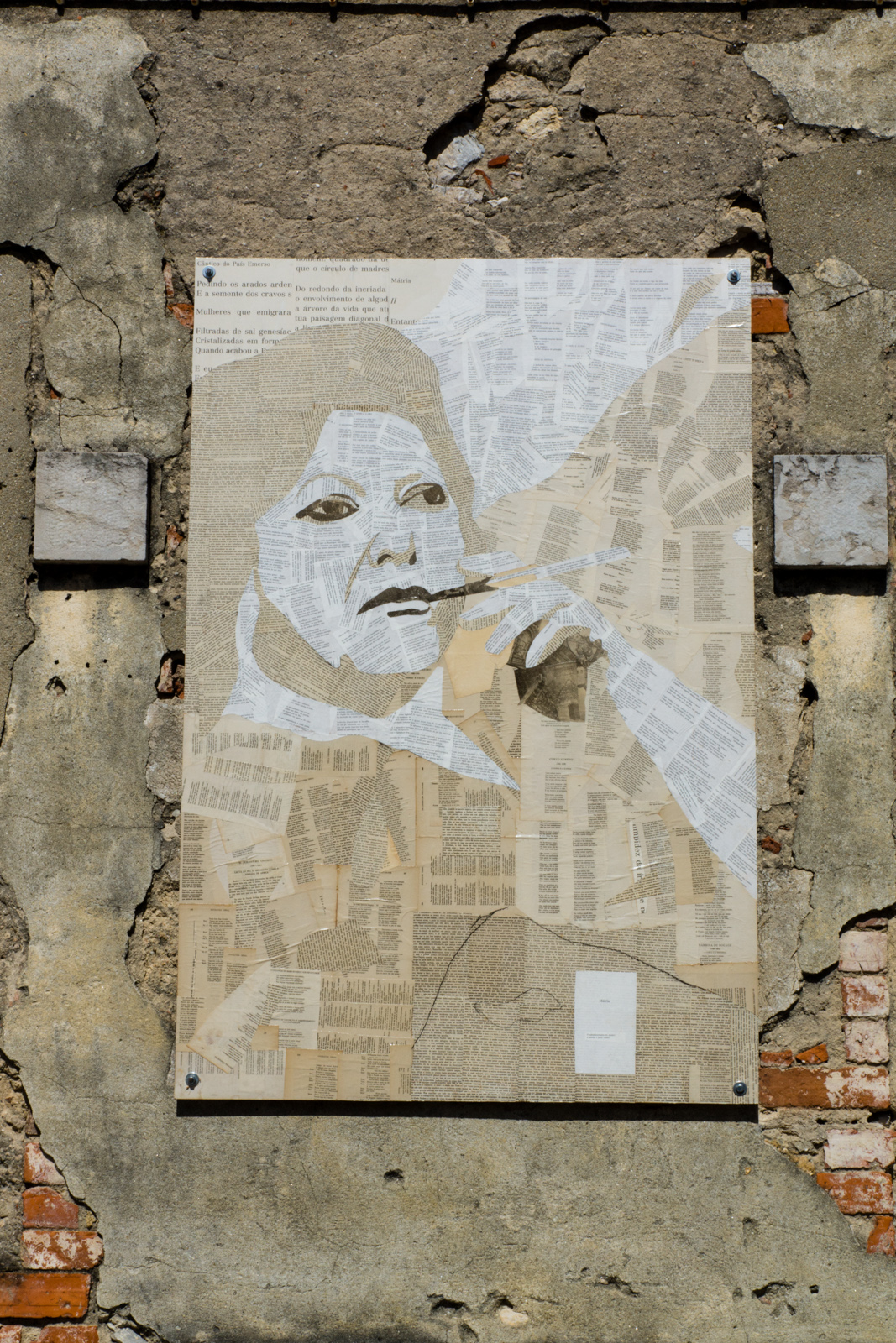 Passeio Literário - 38: Natália Correia (1923-1993)